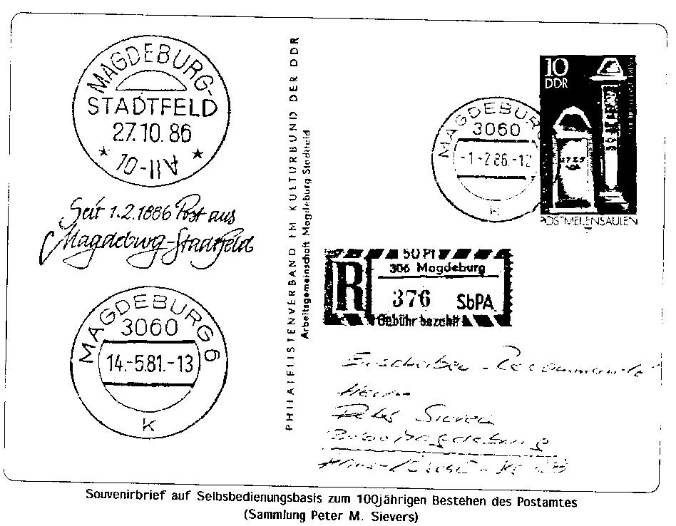 DDR Sonderbrief